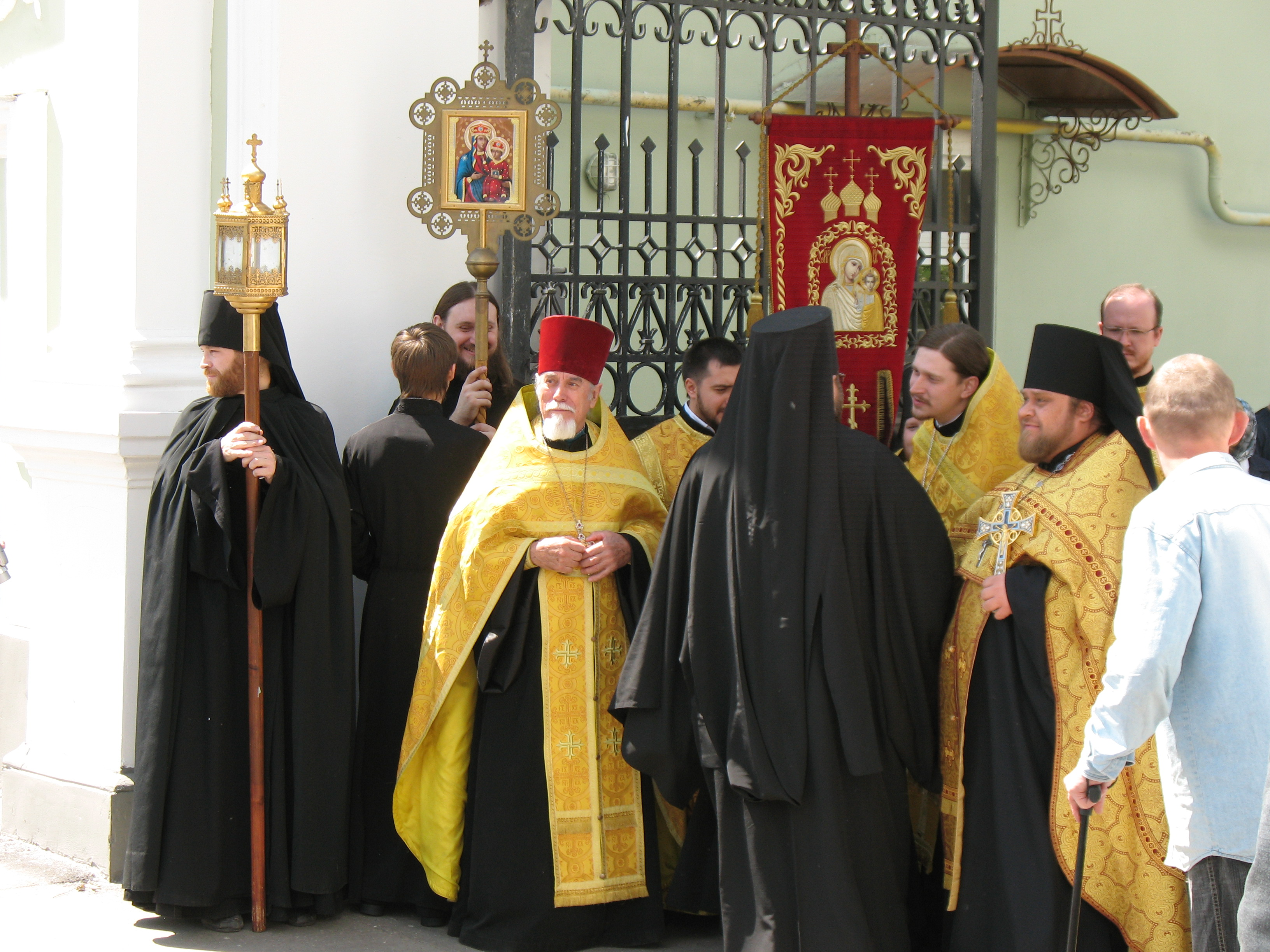 "Встречающий" крестный ход монахов Покровского монастыря навстречу крестному ходу от Благовещенского собора 27 мая 2012 года в честь 20-летия Харьковского собора. На хоругвях главная святыня Солобожанщины - чудотворная Озерянская икона Божией матери. Видна чугунная решётка на входе в монастырь.